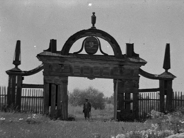 Kożangródek. Barokowa brama do dawnej rezydencji Niemirowiczów-Szczyttów.